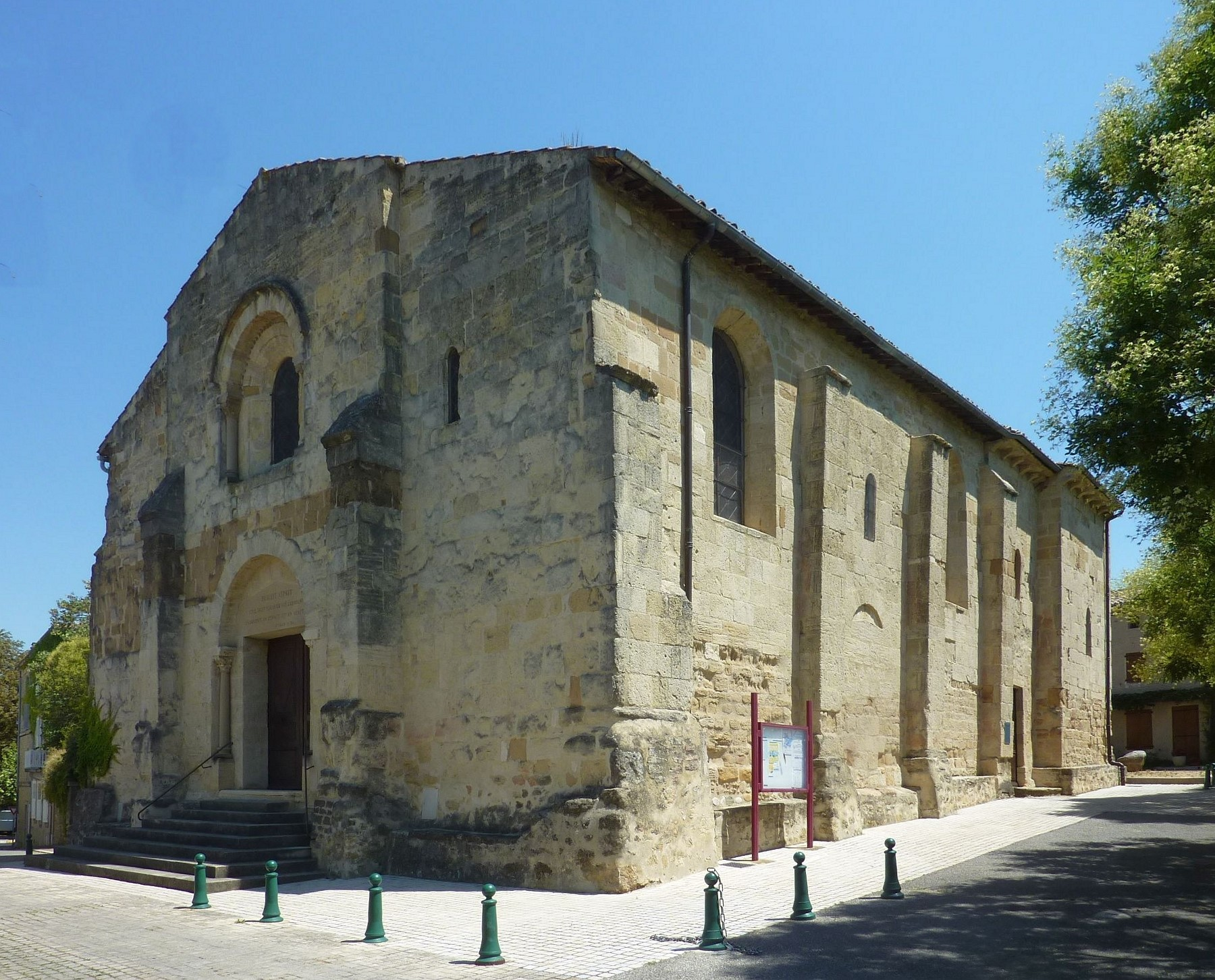 Église simultanée de Beaumont-lès-Valence